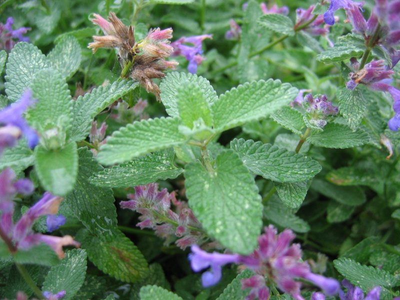 Blatt von Mussins Katzenminze Nepeta mussinii